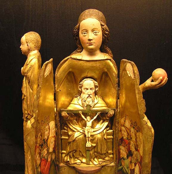 Statue de la Vierge - reliquaire - hôtel de Cluny, Paris - Musée national du Moyen Âge